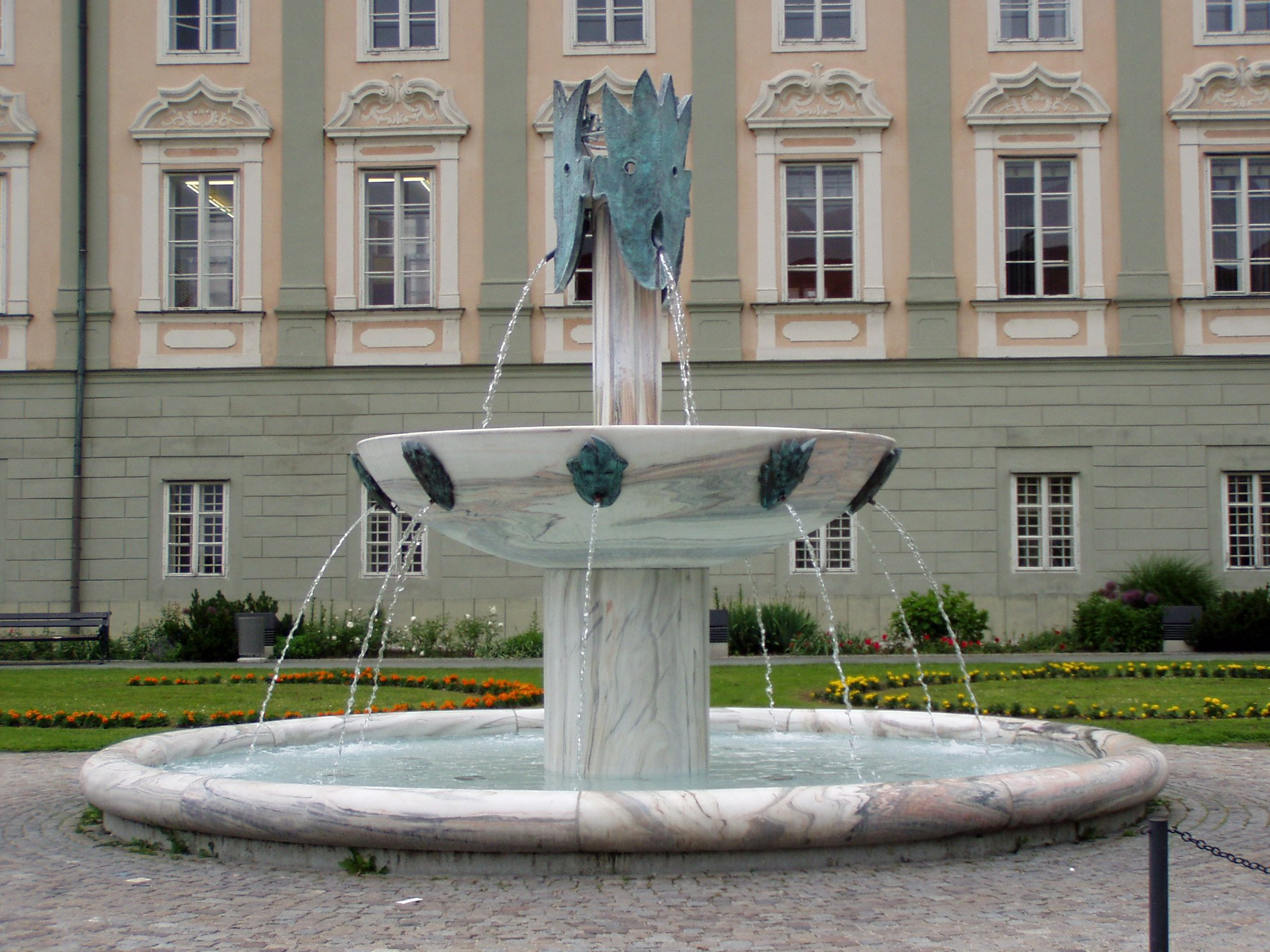 Kiki Kogelnik Brunnen im Landhauspark, Klagenfurt/Kiki Kogelnik Fountain in Klagenfurt Carinthia